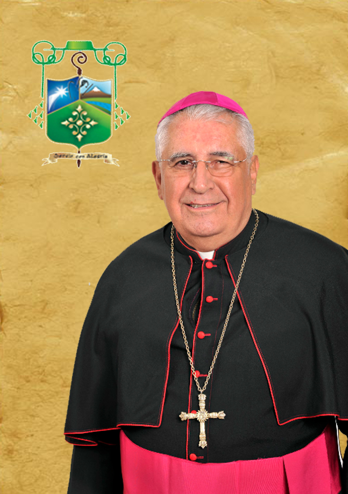 XI obispo de la Diócesis de Colima